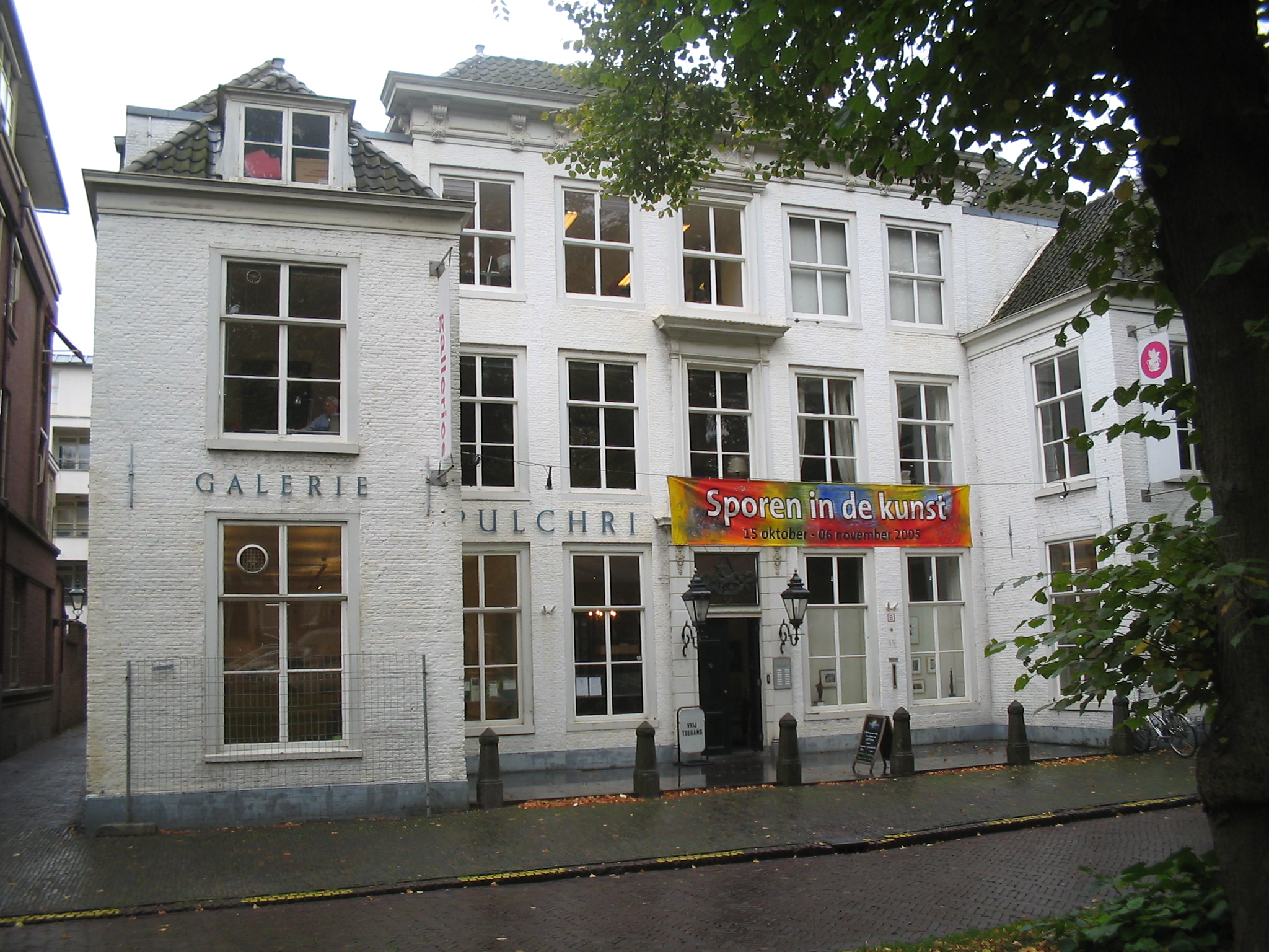 Pulchri Studio, Lange Voorhout , Den Haag, Netherlands, 21 oktober 2005